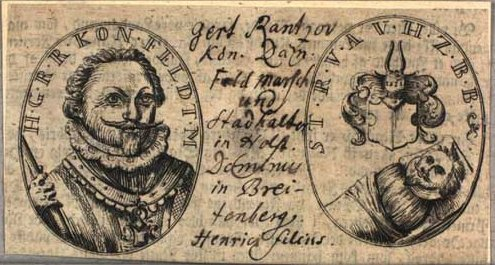 Gerhard (auch:Gert, Geert) Rantzau (1588-1627)